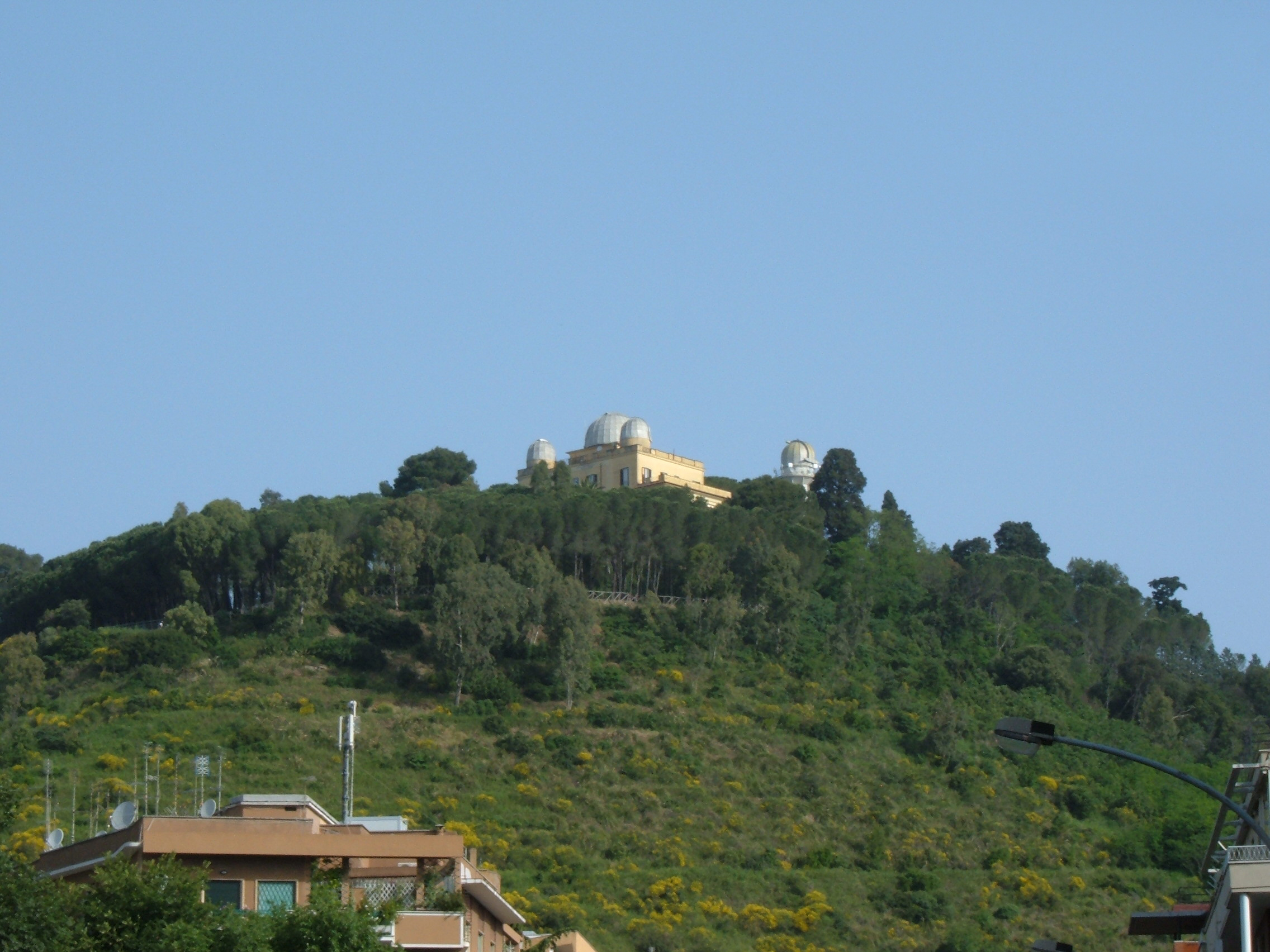 L'osservatorio di Monte Mario, a Roma.